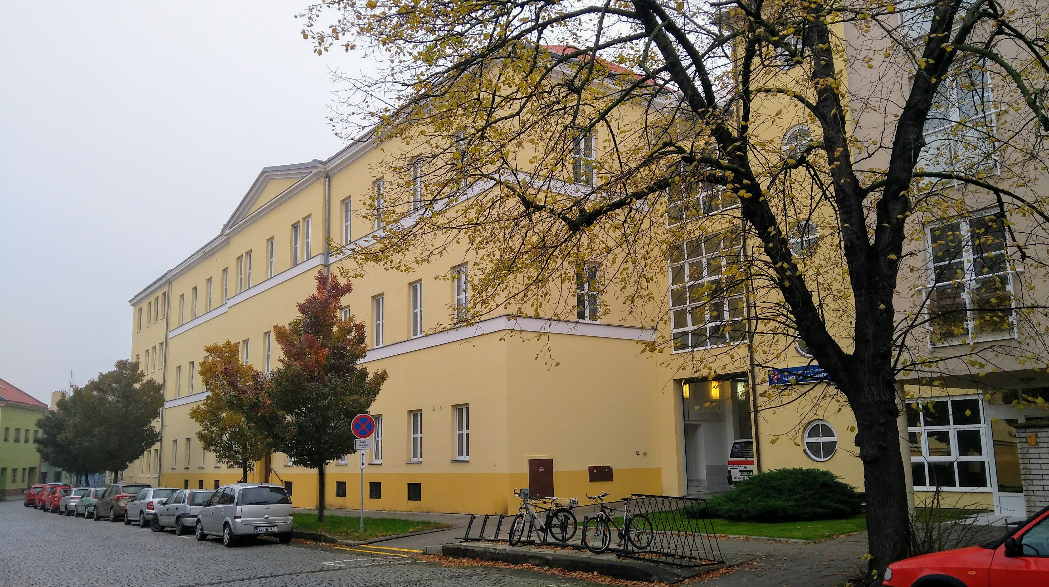 Nemocnici Milosrdných sester svatého Vincence de Paul, Kroměříž